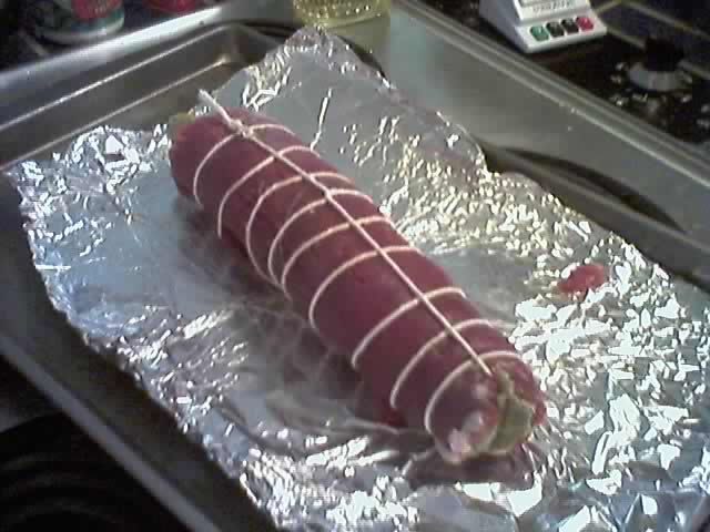 Roulade